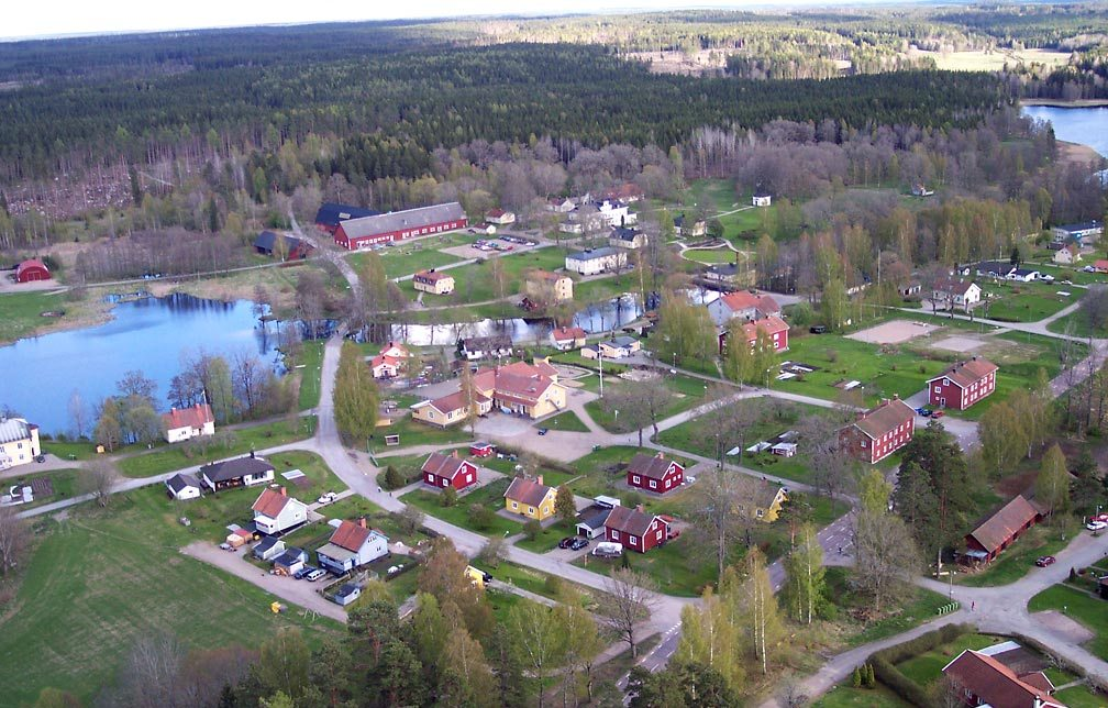 Östra delen av Färna med Färna herrgård i bakgrunden